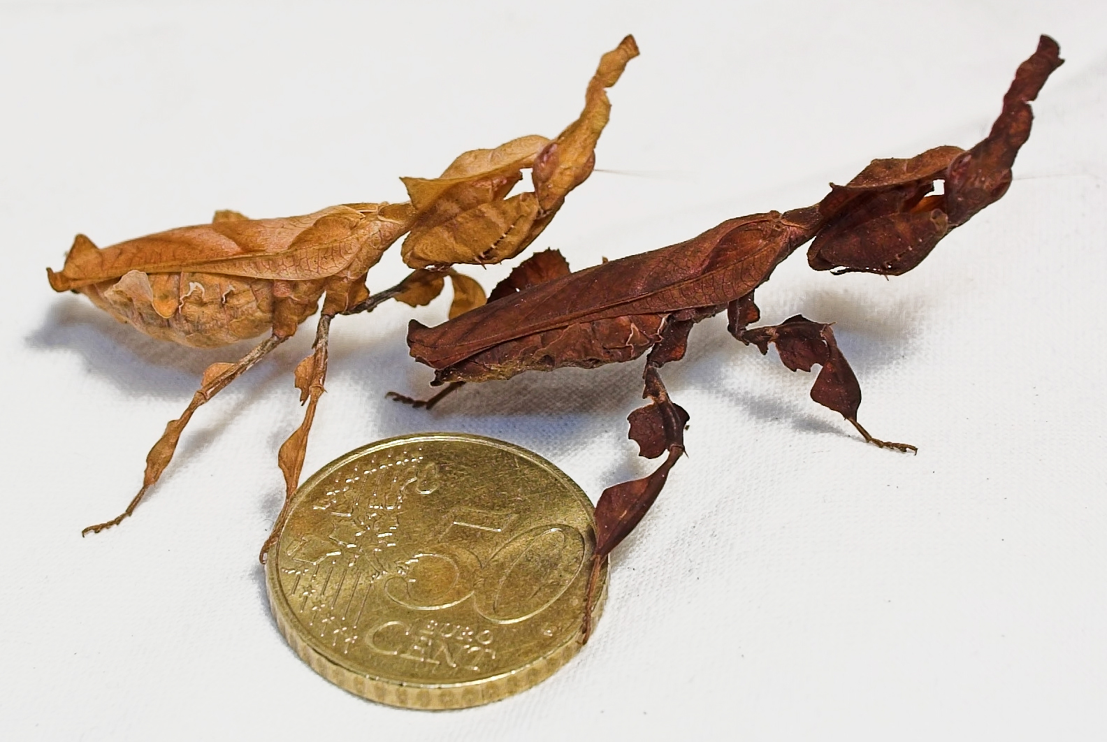 Phyllocrania paradoxa (Morphology)